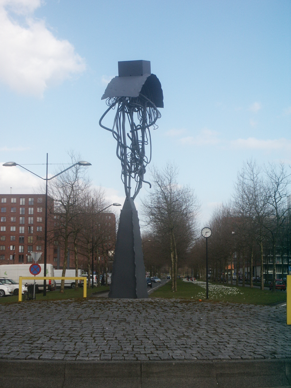 Anton Martineau: Kop met vier Neuzen, staalsculptuur (2008) Amsterdam, Bijlmermeer: Bijlmerdreef rotonde Groesbeekdreef